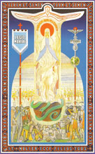 Imagen de la Tessera que se usa en la Legión de Maria